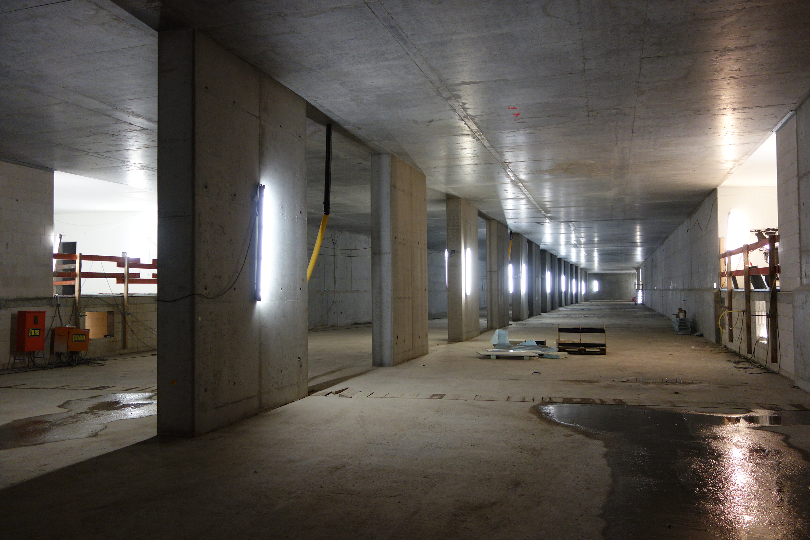 Berlin, U-Bahnhof Rotes Rathaus, fertiger Rohbau in der unteren Ebene (U3), die zunächst als Abstellanlage genutzt wird.